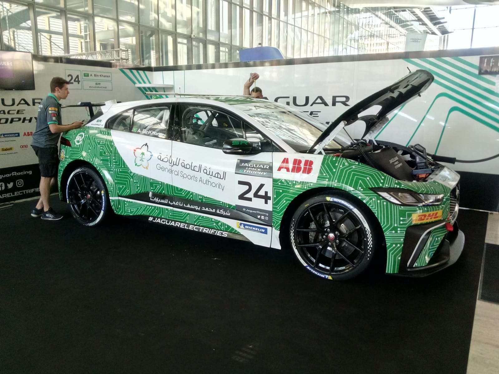 Formula E - Gran Premio di Roma 2019